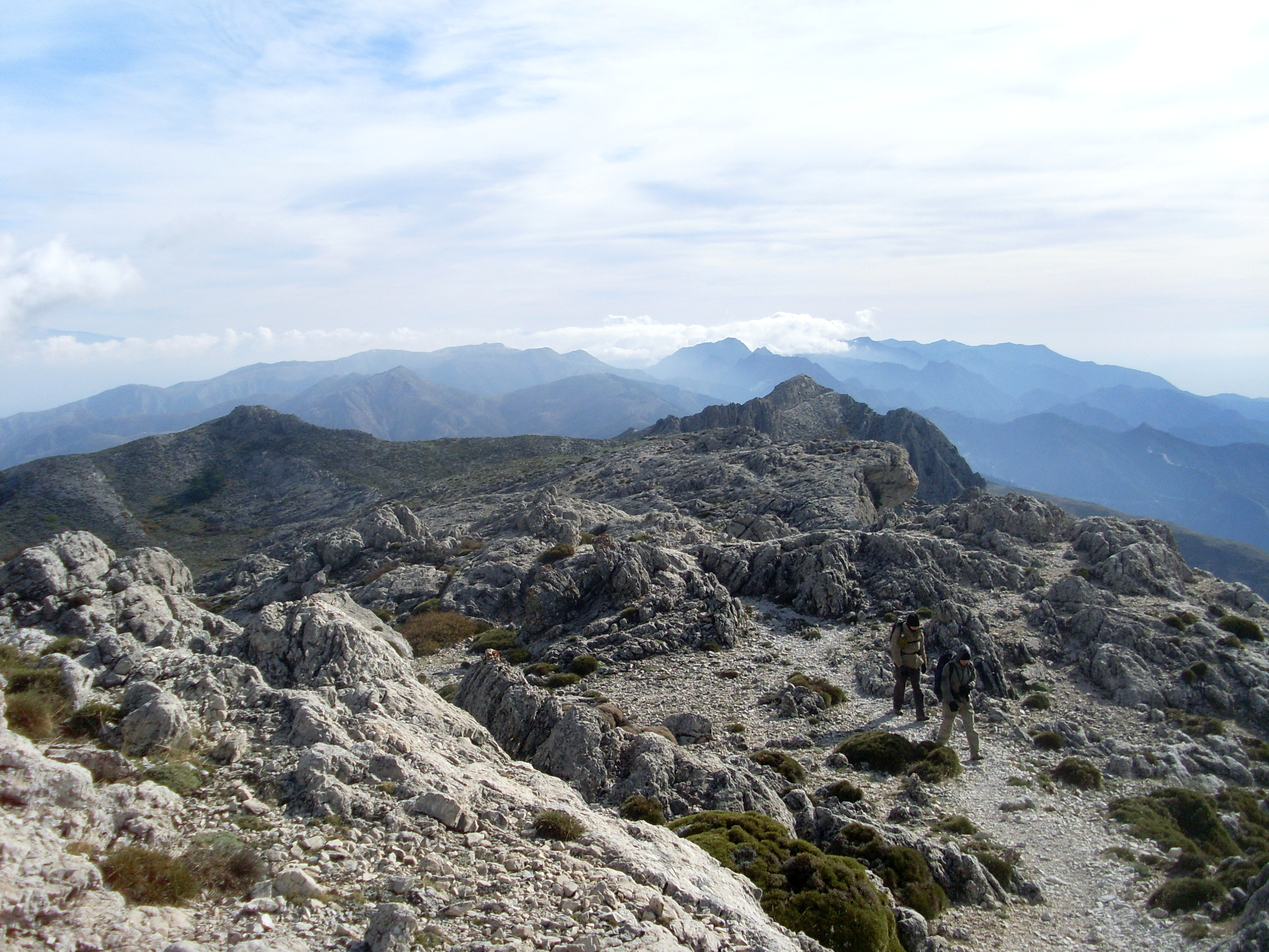 Sierra de Tejeda, Málaga, ruta del salto del Caballo, España, noviembre de 2010